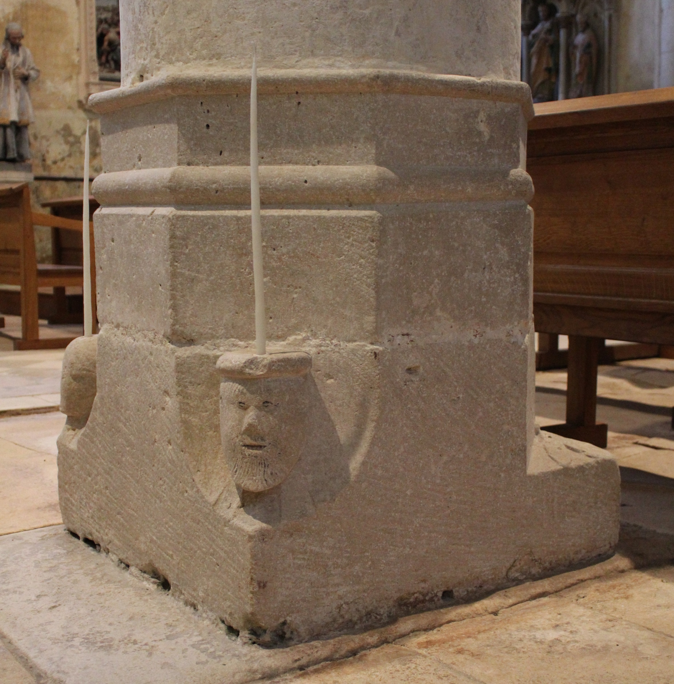 porte cierge homme vue de droite creuë